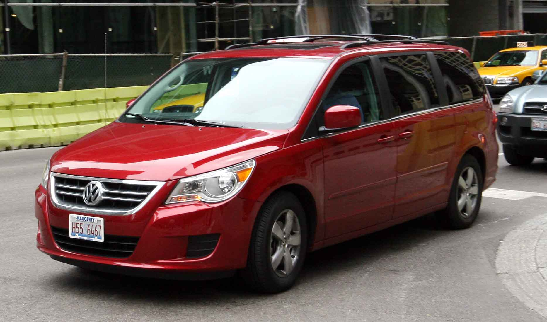 Volkswagen Routan